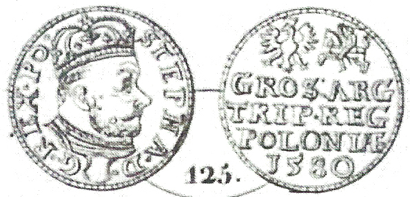 Trojak_Batory__1580_Orzeł+Pogoń